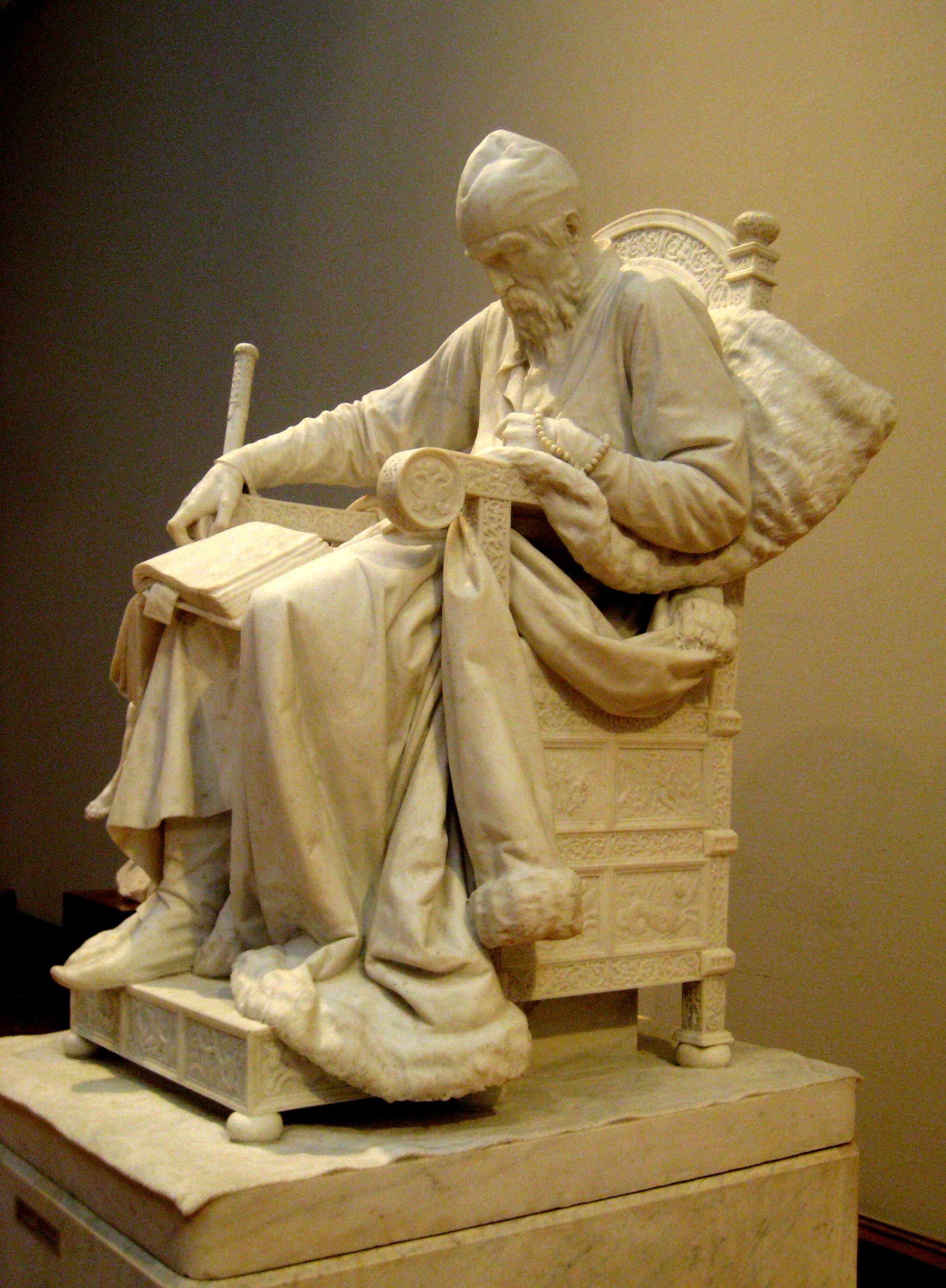 «Царь Иоанн Васильевич Грозный». Скульптура работы Марка Антокольского. Мрамор, ГТГ. 1875 год. Скульптура выполнена по заказу П. М. Третьякова.